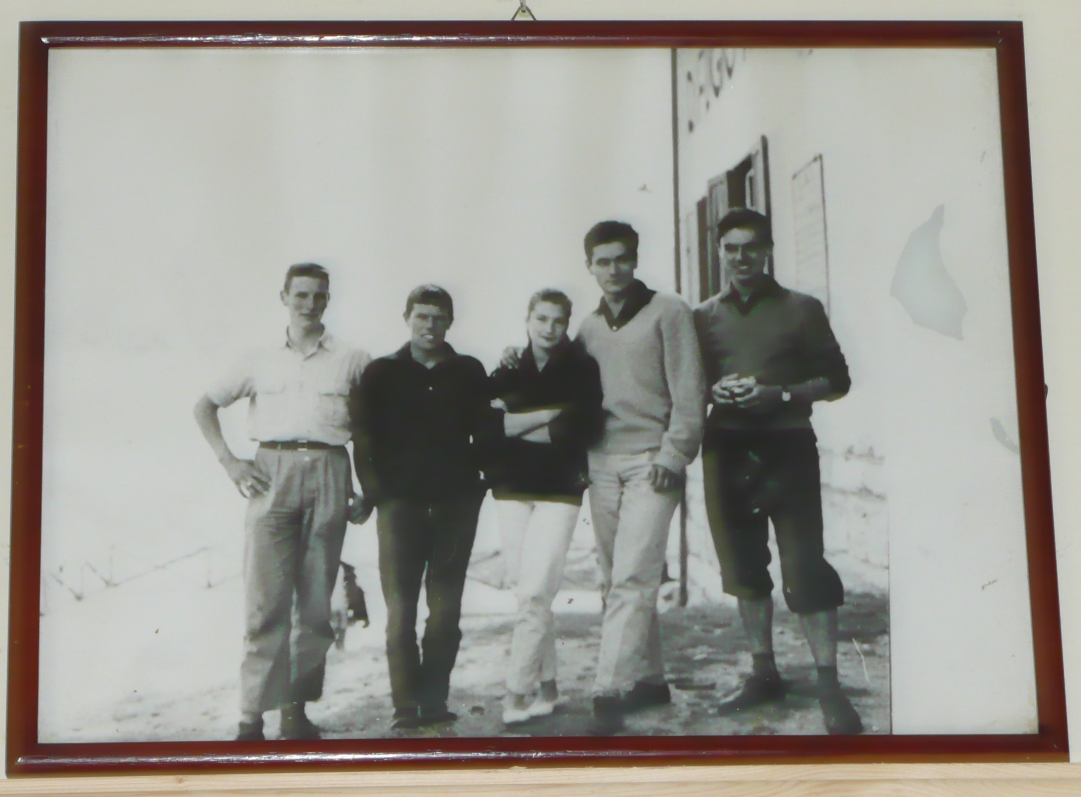 Bild von Dietrich Hasse (links) und Gefährten in der Dreizinnenhütte